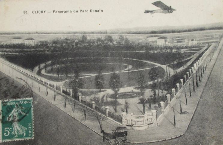 Clichy.Parc Denain.Parc Roger-Salengro.Panorama